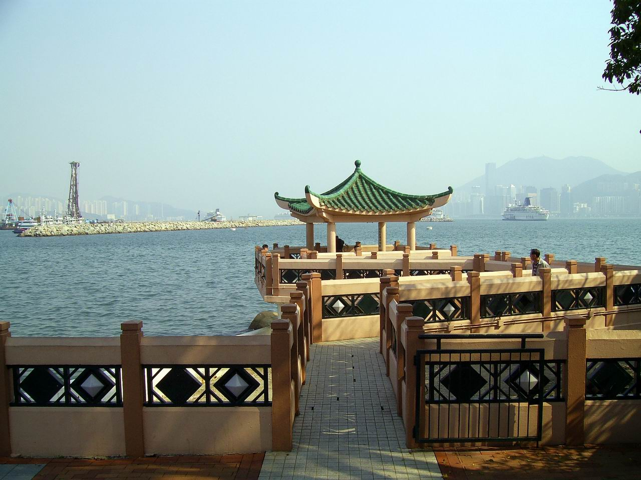 海心亭